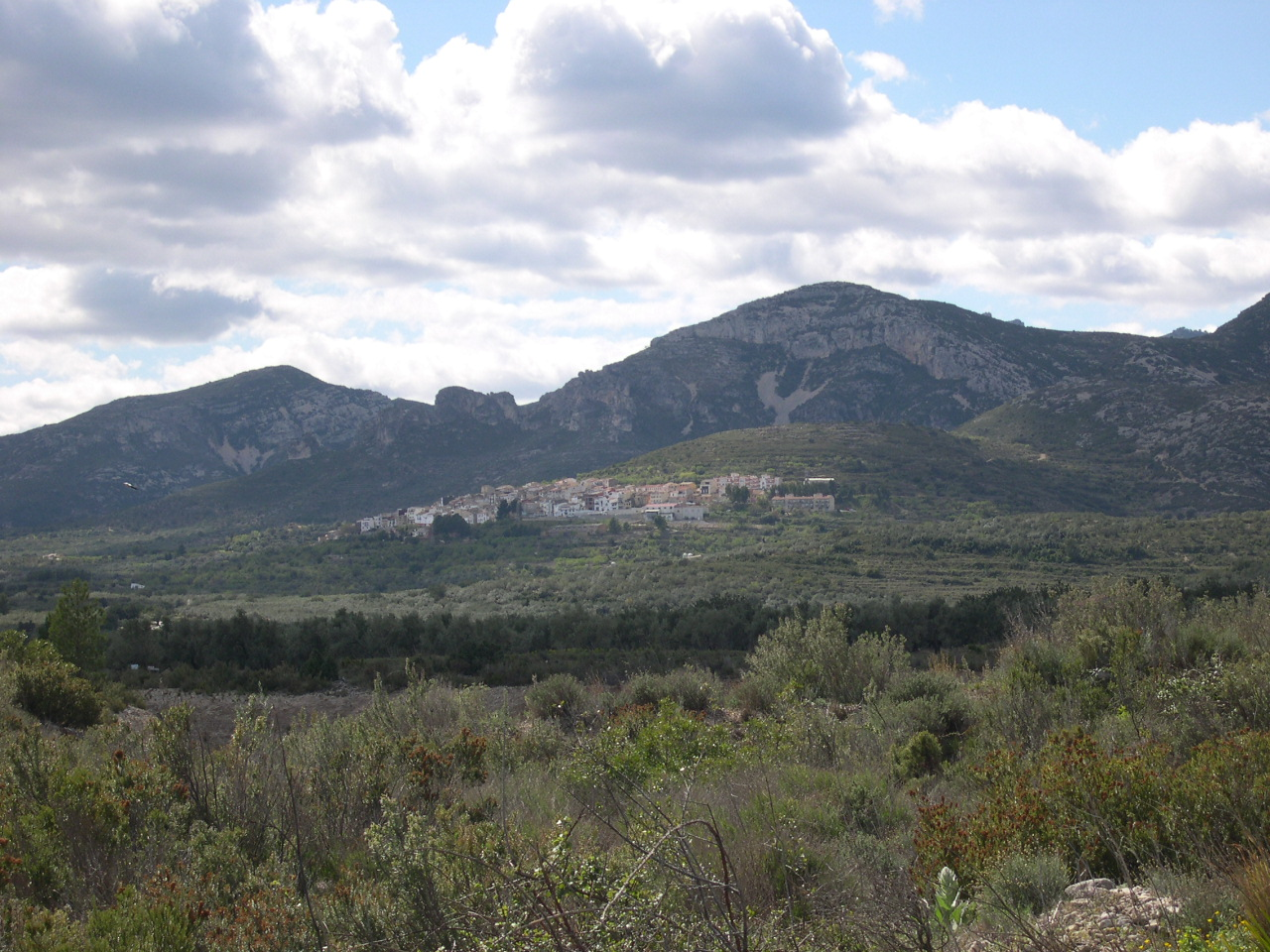 Fotografia presa des de la carretera de Tortosa